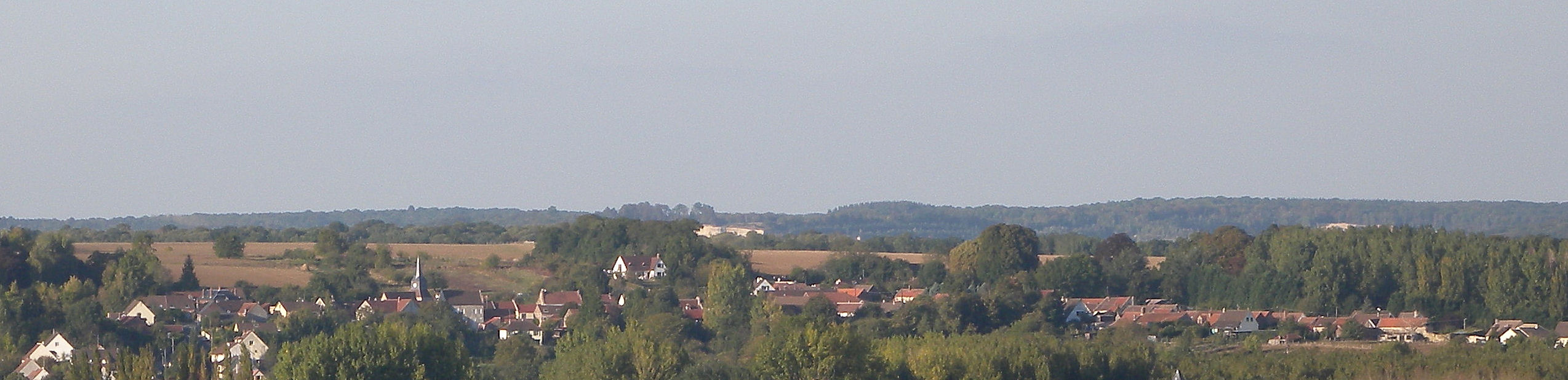 Vue Nord Est du Village de Giraumont